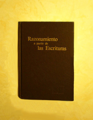 Razonamiento a partir de las Escrituras, editado por los testigos de Jehová.